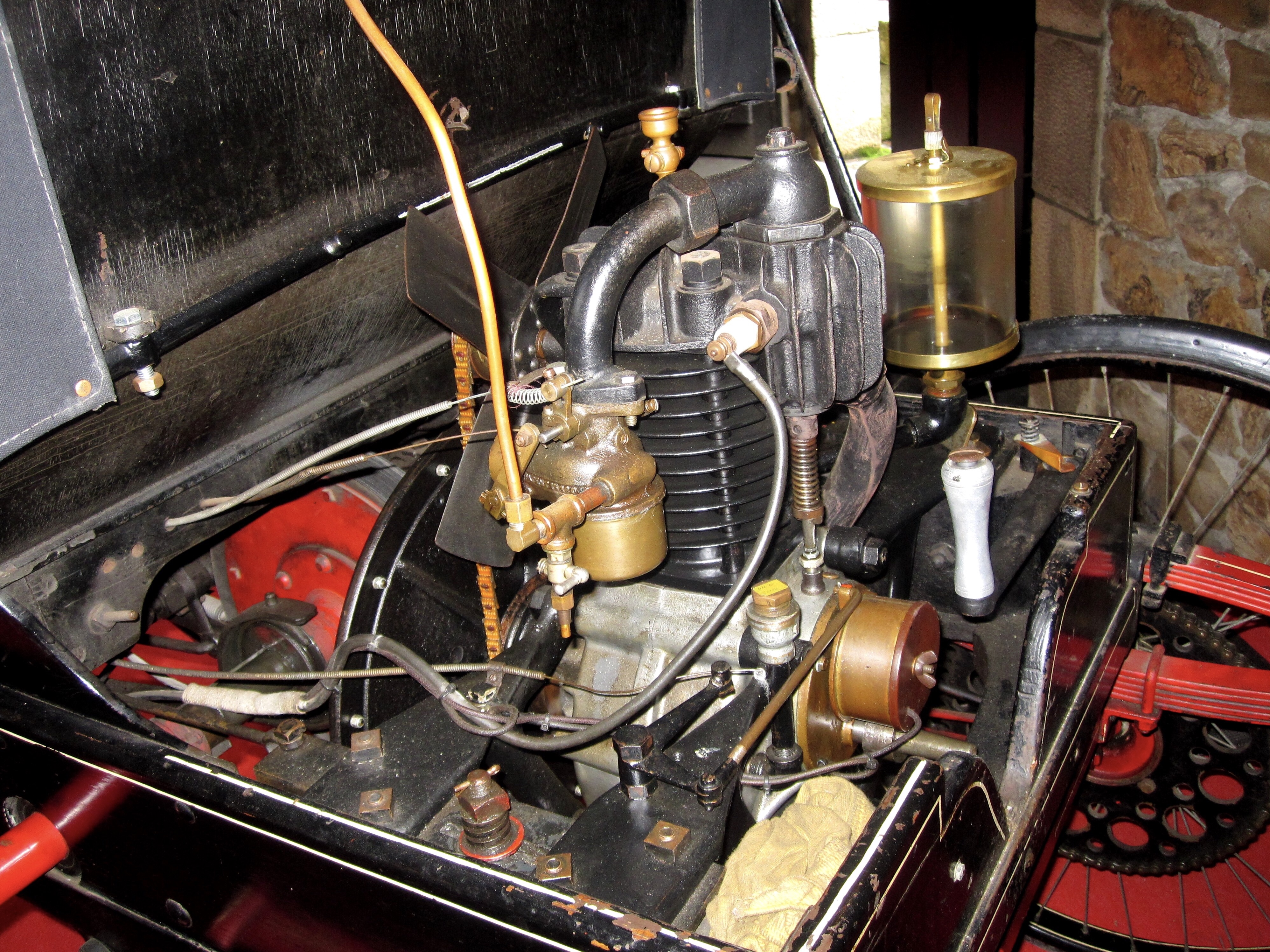 1898 Allen Runabout Motor